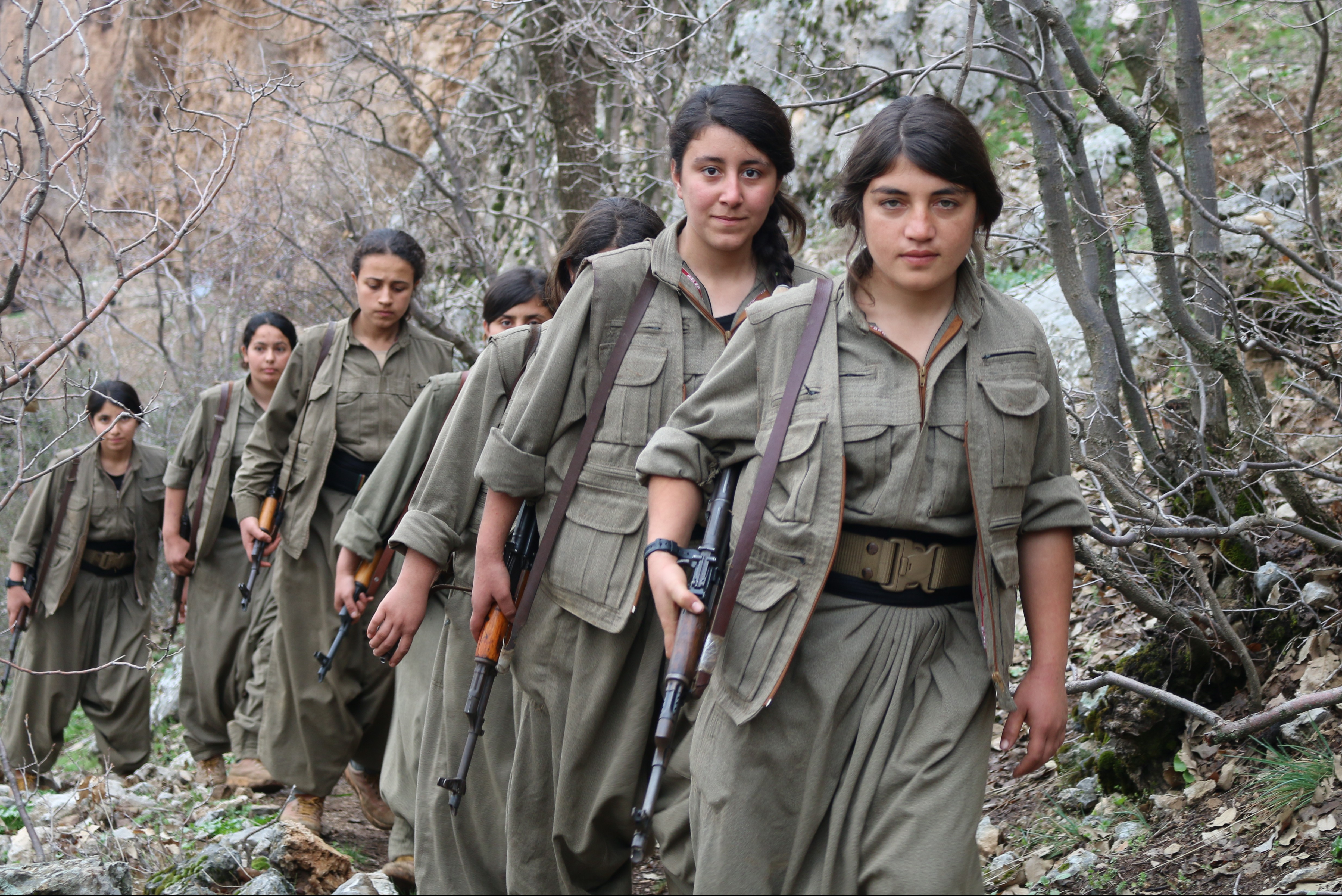 YPG